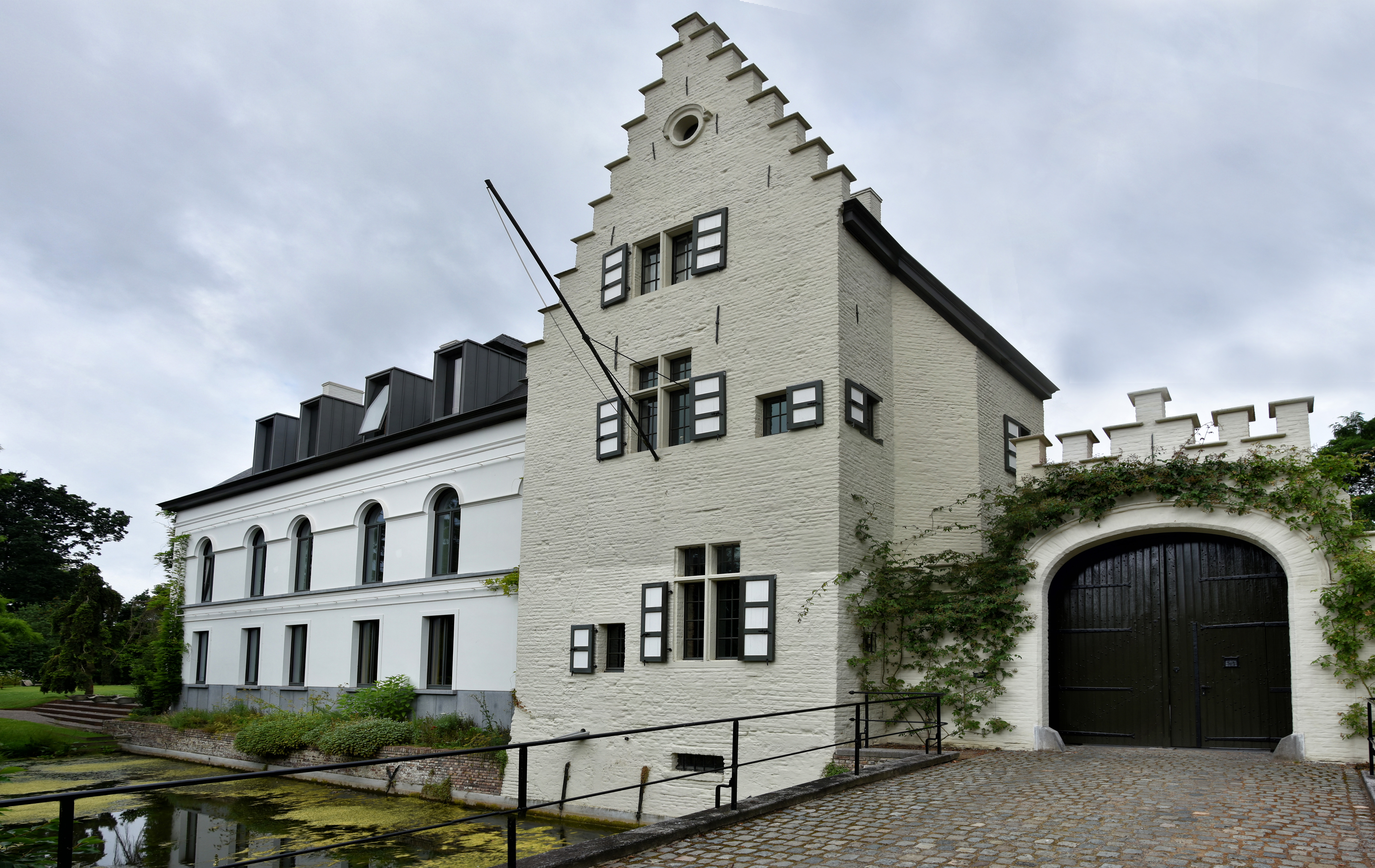 Kasteel de Oude Kluis te Gentbrugge, België